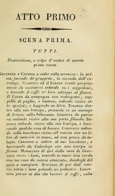 Raccolta di commedie scelte dell'avvocato C. Goldoni. Tomo 1. [-8.]. 2. - Livorno : stamperia Vignozzi, 1819. - 355, [1] p..